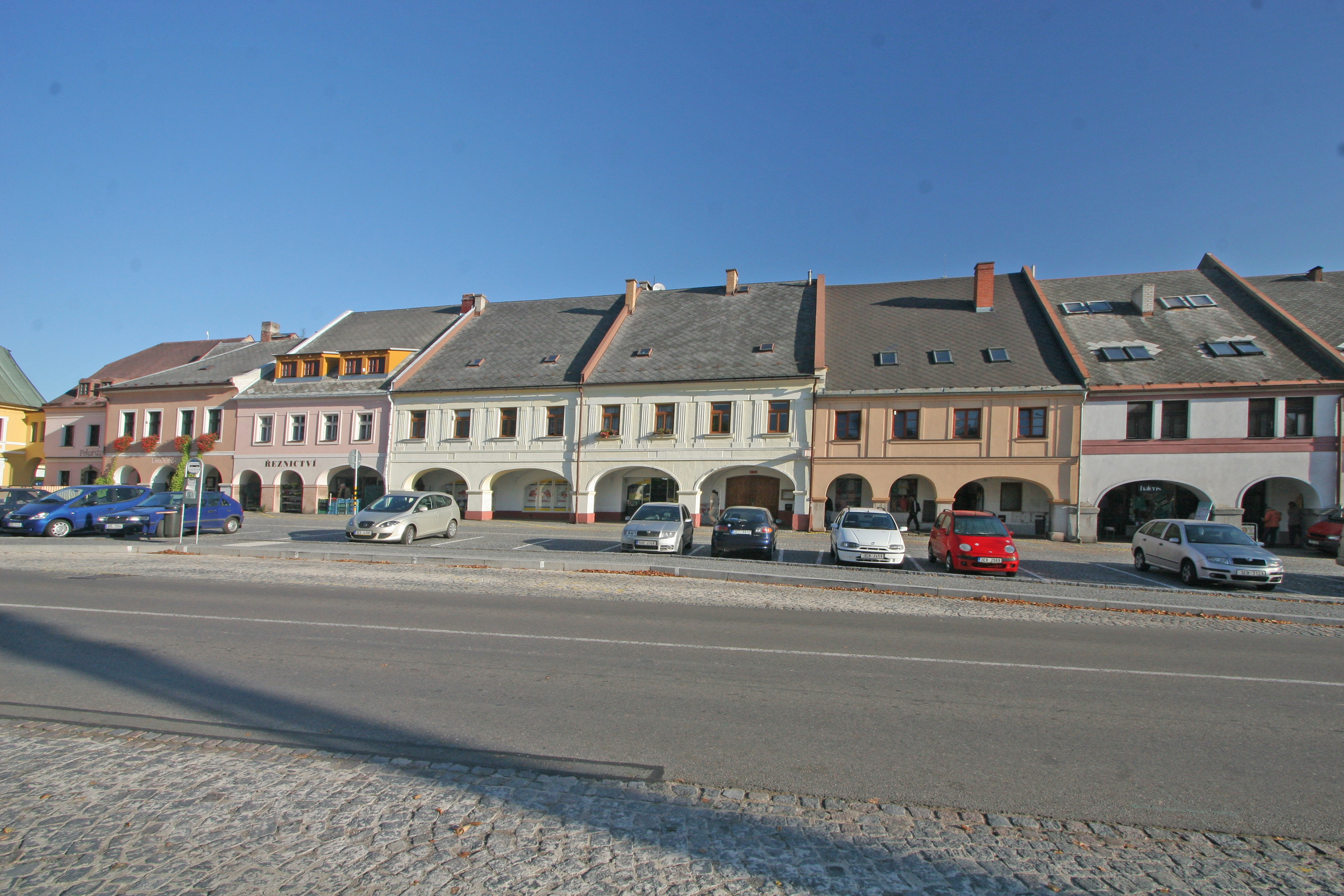 Městský dům (Letohrad), Václavské náměstí 50, Letohrad